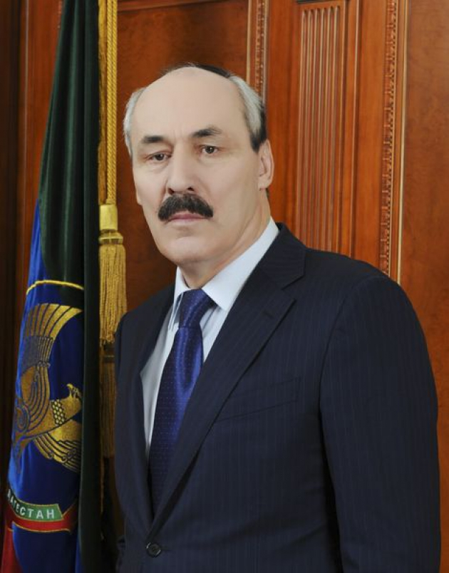 Глава Дагестана Рамазан Гаджимурадович Абдулатипов